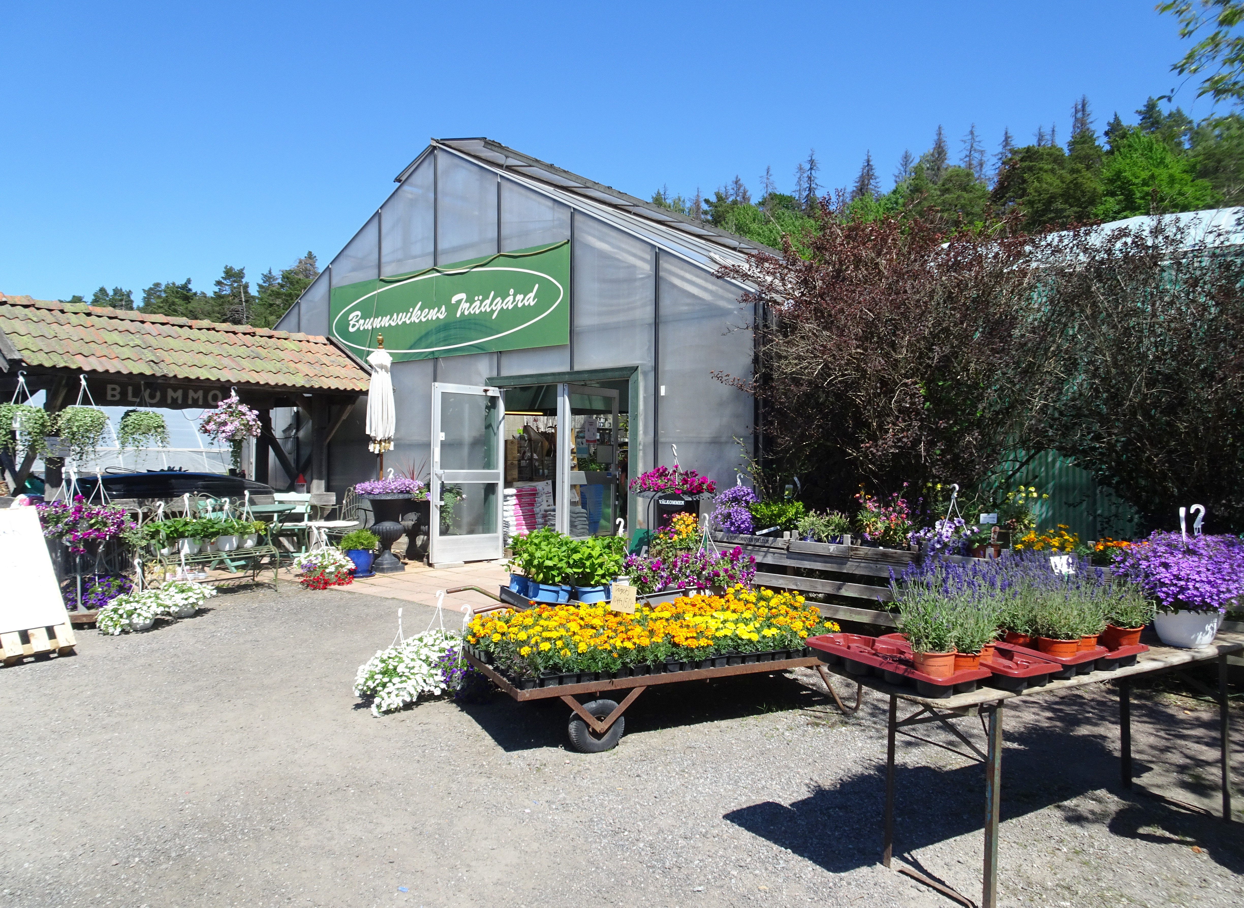 Brunnsvikens handelsträdgård ligger på Ulriksdals slottsområde där Sköndals handelsträdgård fanns en gång i tiden.